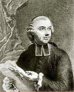 retrato de condillac